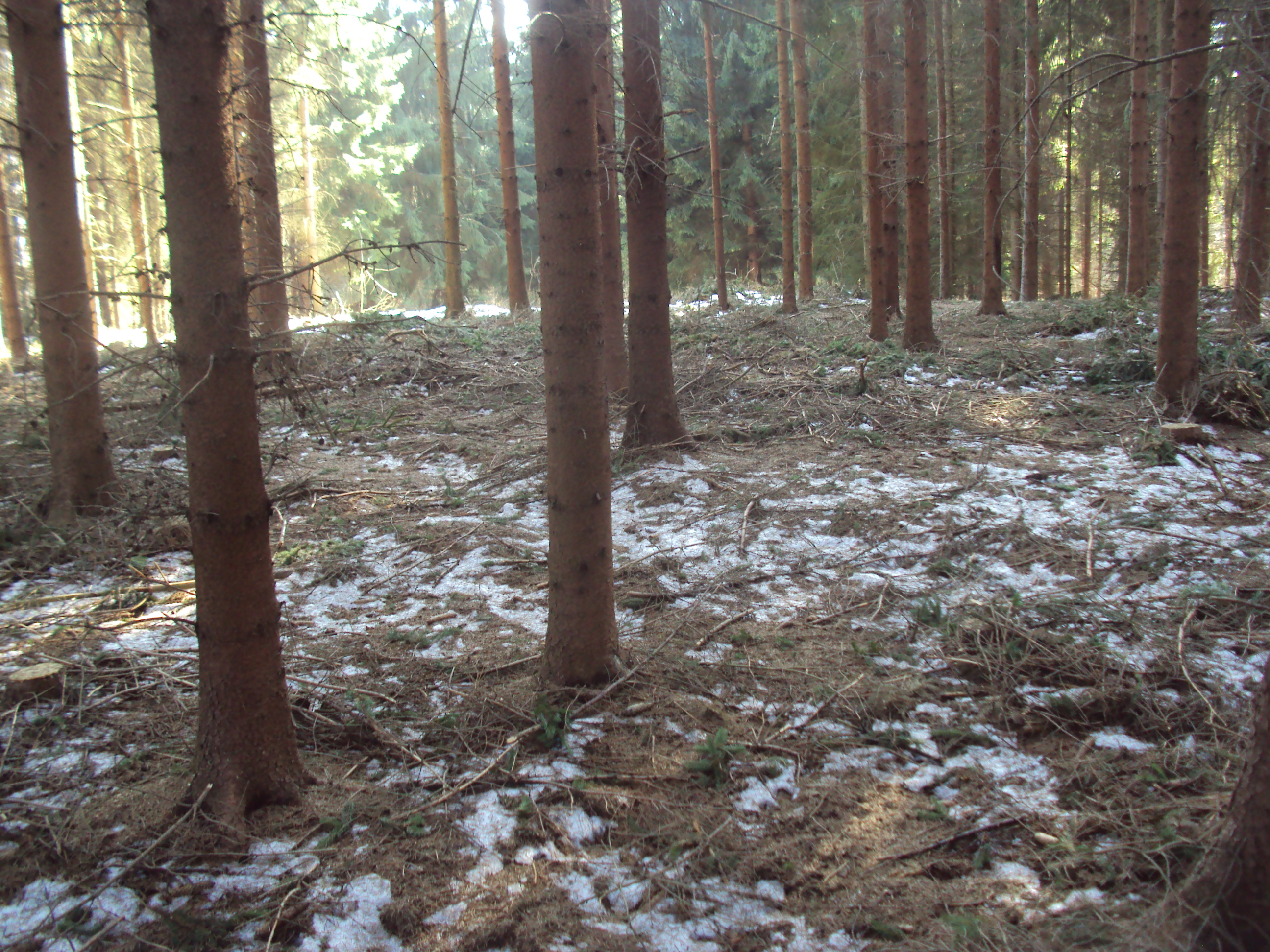 Vrcholová část Ovčího vrchu u Zákup